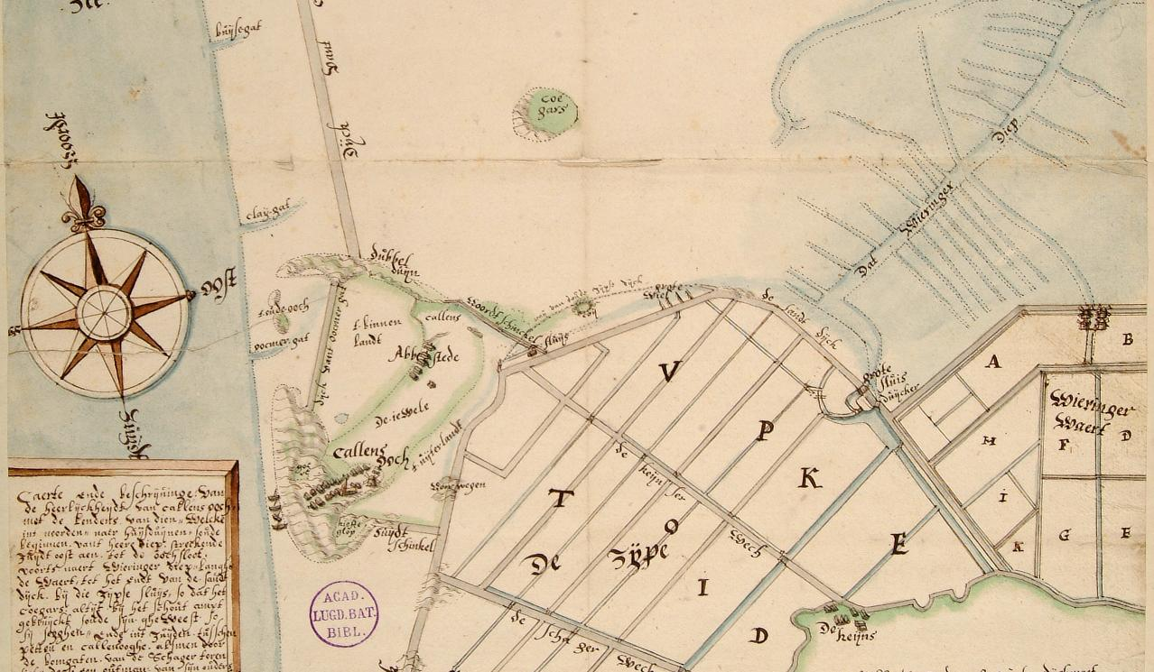 17de eeuwse kaart van Callantsoog, Collectie Bodel Nijenhuis, Bijzondere Collecties, Universiteitsbibliotheek Leiden